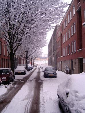 De Blankenstraat is een straat in de Czaar Peterbuurt in Amsterdam.